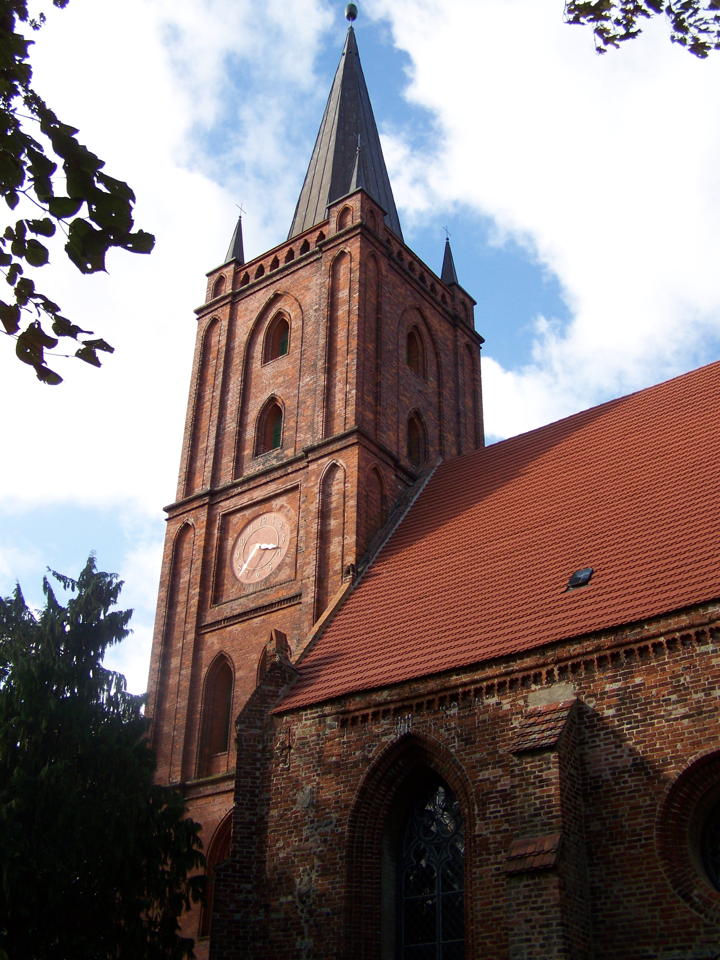 Kirche Gristow, Turm (2009-10-04)